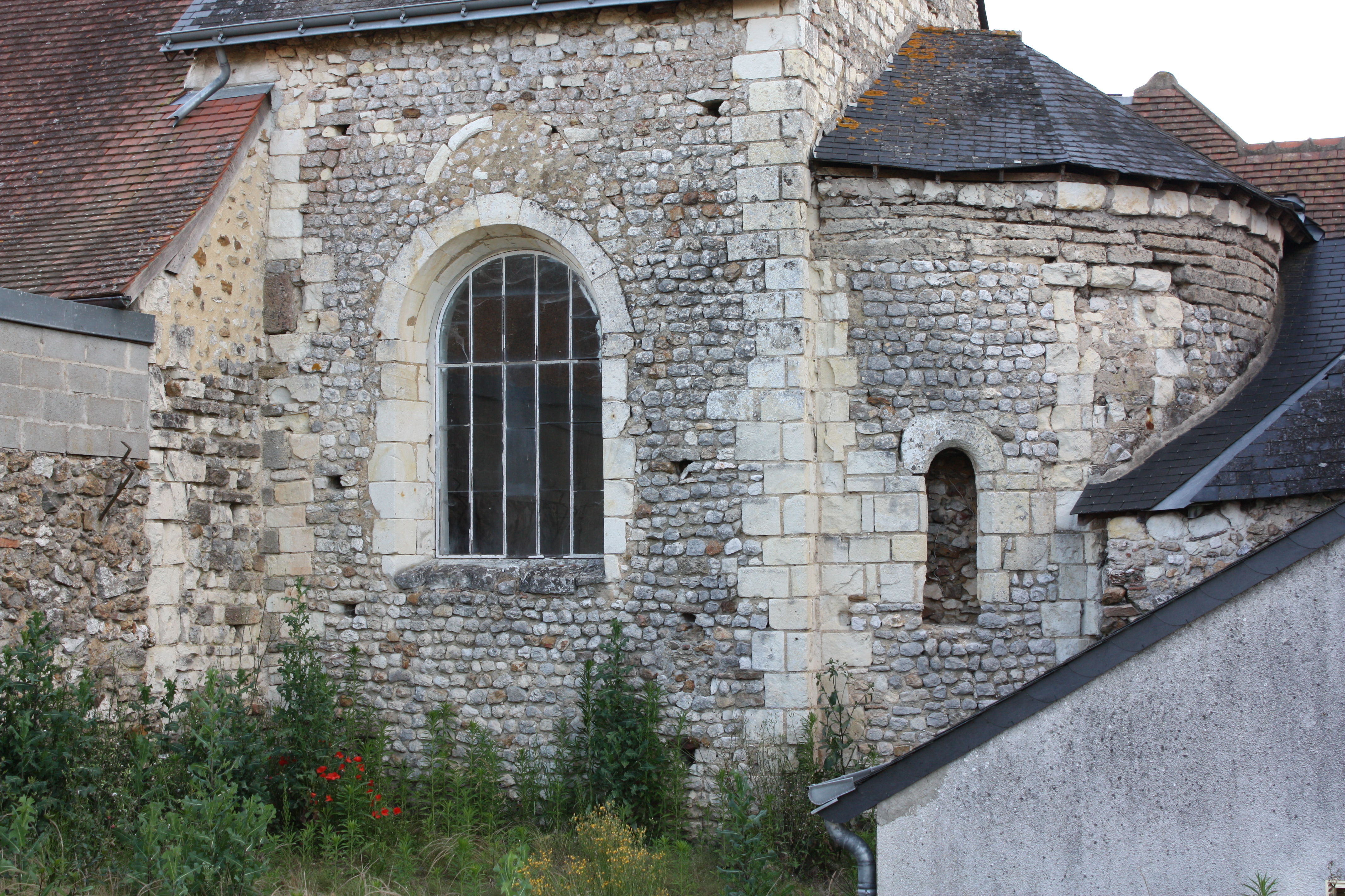 La Pellerine - Eglise Saint-Aubin L'abside